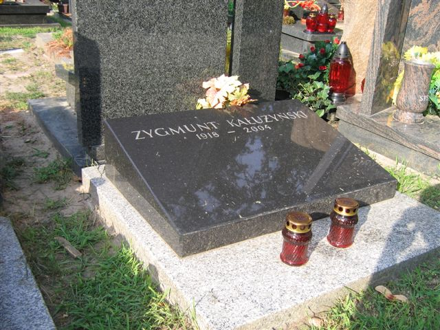 Zygmunt Kałużyński's monument (Powązki Cemetery; Cmentarz Komunalny, d. Wojskowy)